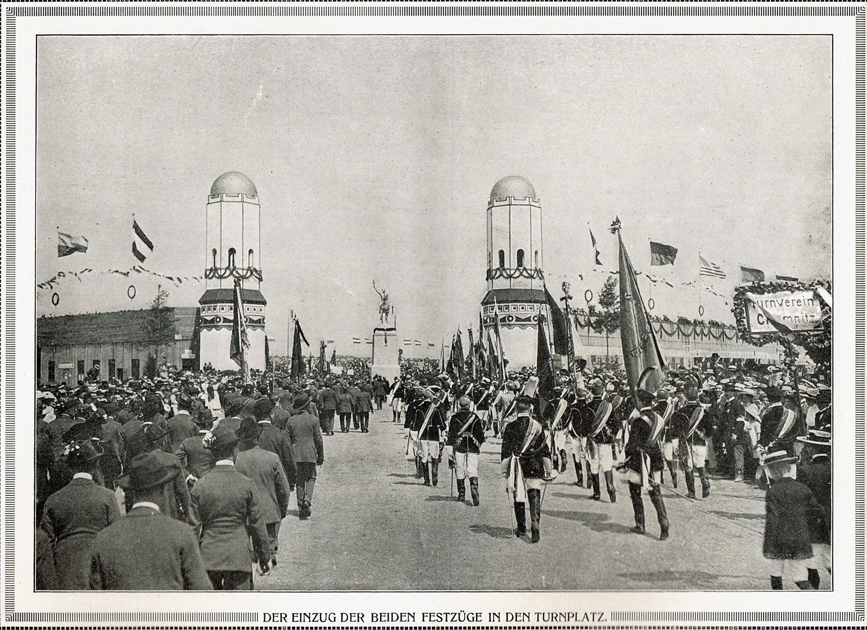 Deutsches Turnfest 1913 in Leipzig, Festzug vor dem Festplatz